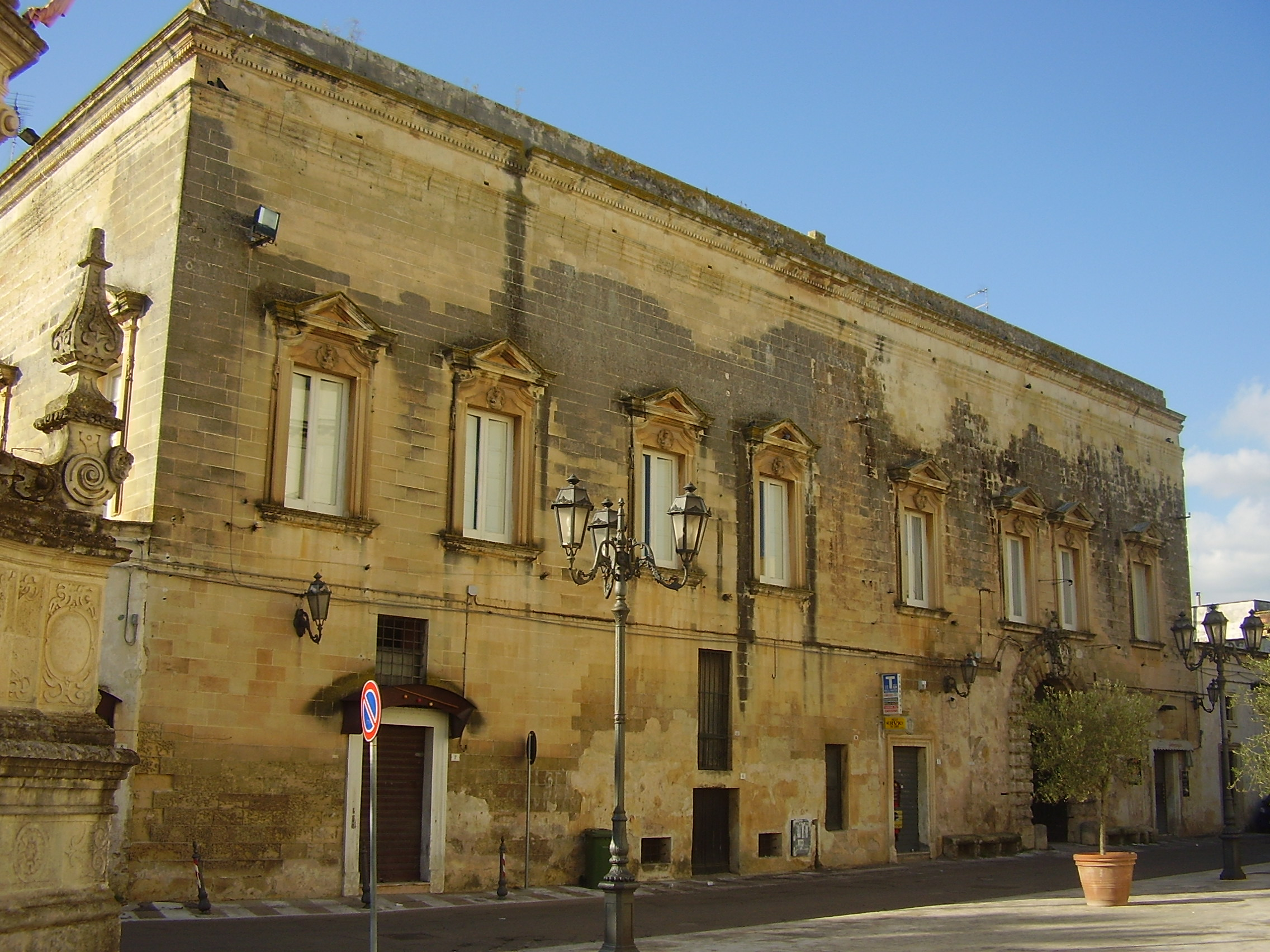 Palazzo dei Saluzzo Lequile, Lequile